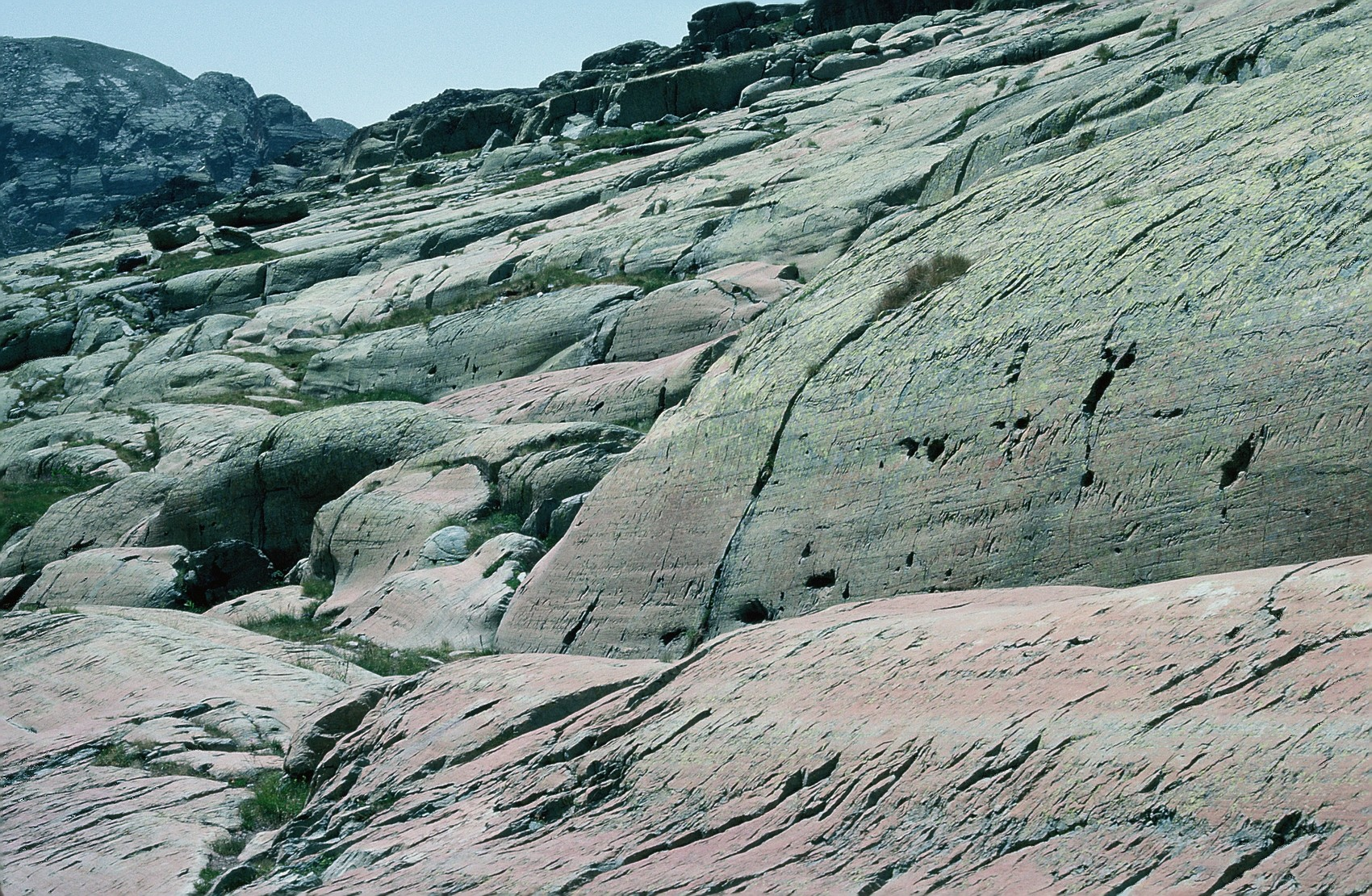 La Vallée des Merveilles, France.